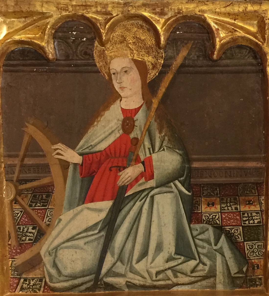 Musée de la Collégiale Sainte-Marie de Xàtiva